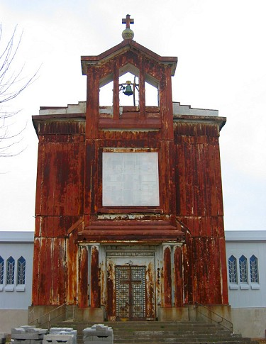 Eglise Sainte Barbe de Crusnes (Meurthe-et-Moselle), France